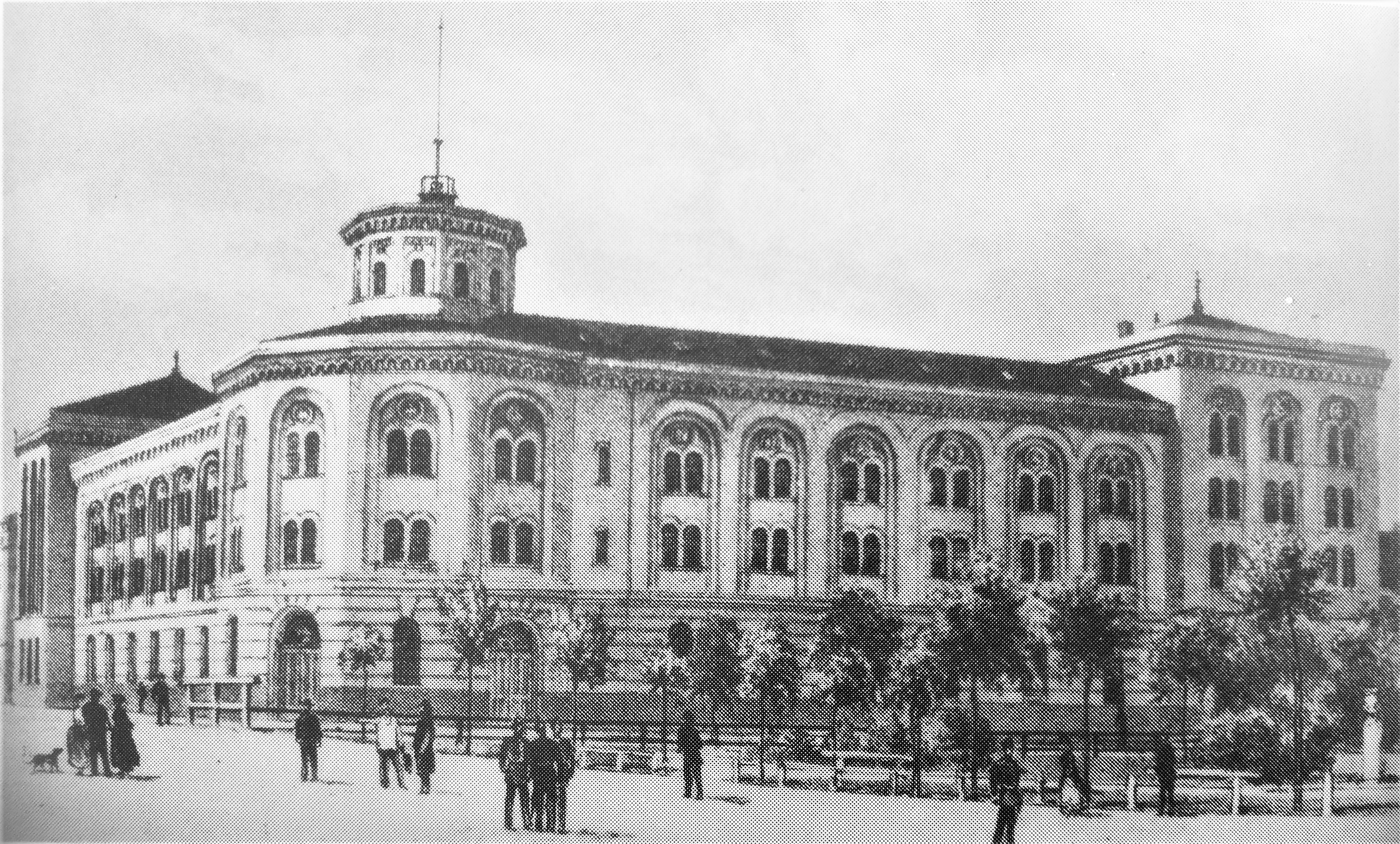 Arsenał Artyleryjski w Poznaniu na ul. Garbary w 1871 r. - litografia R. Geisslera.